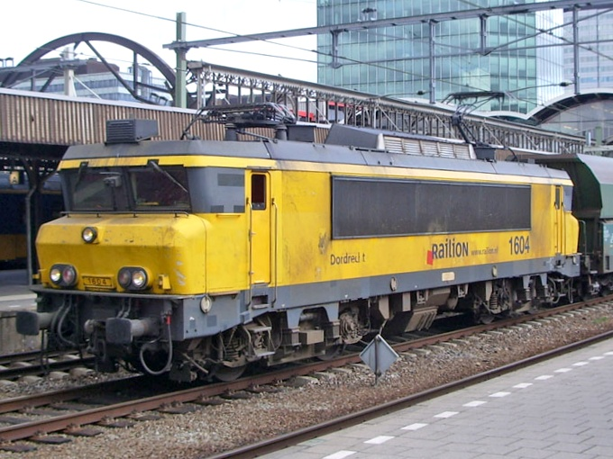 Locomotief 1604 "Dordrecht" van Railion te Utrecht Centraal. Eigen foto T.Houdijk, maart 2006.